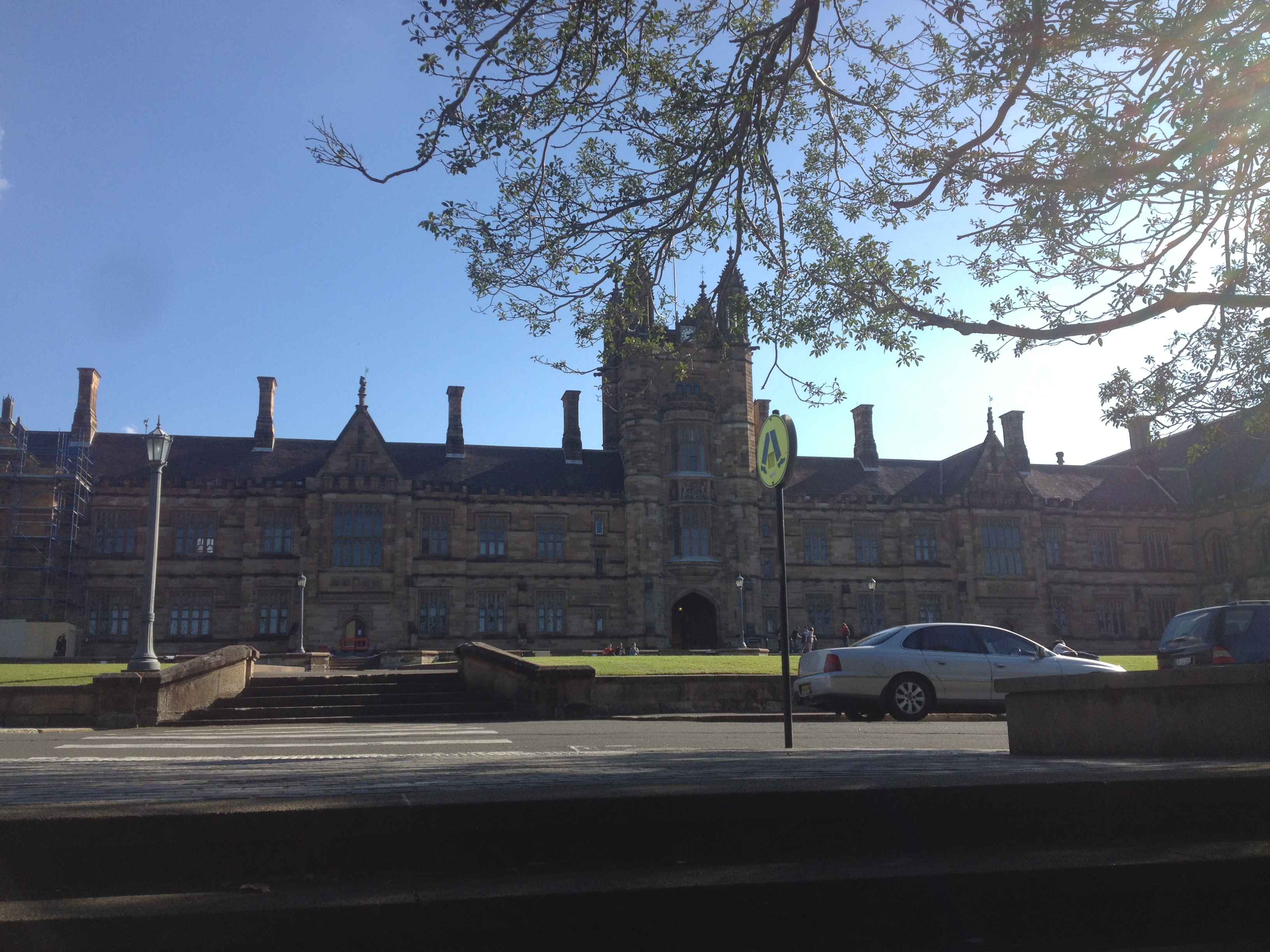 悉尼大学校门